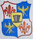 Fausto Braganti que j'ai contacté à propos de la Goliardia m'a demandé de mettre son dessin sur Commons, car il ne sait pas comment procéder pour le faire, afin que ce dessin puisse se retrouver dans l'article Goliardia du Wikipédia italien et du Wikipédia français.